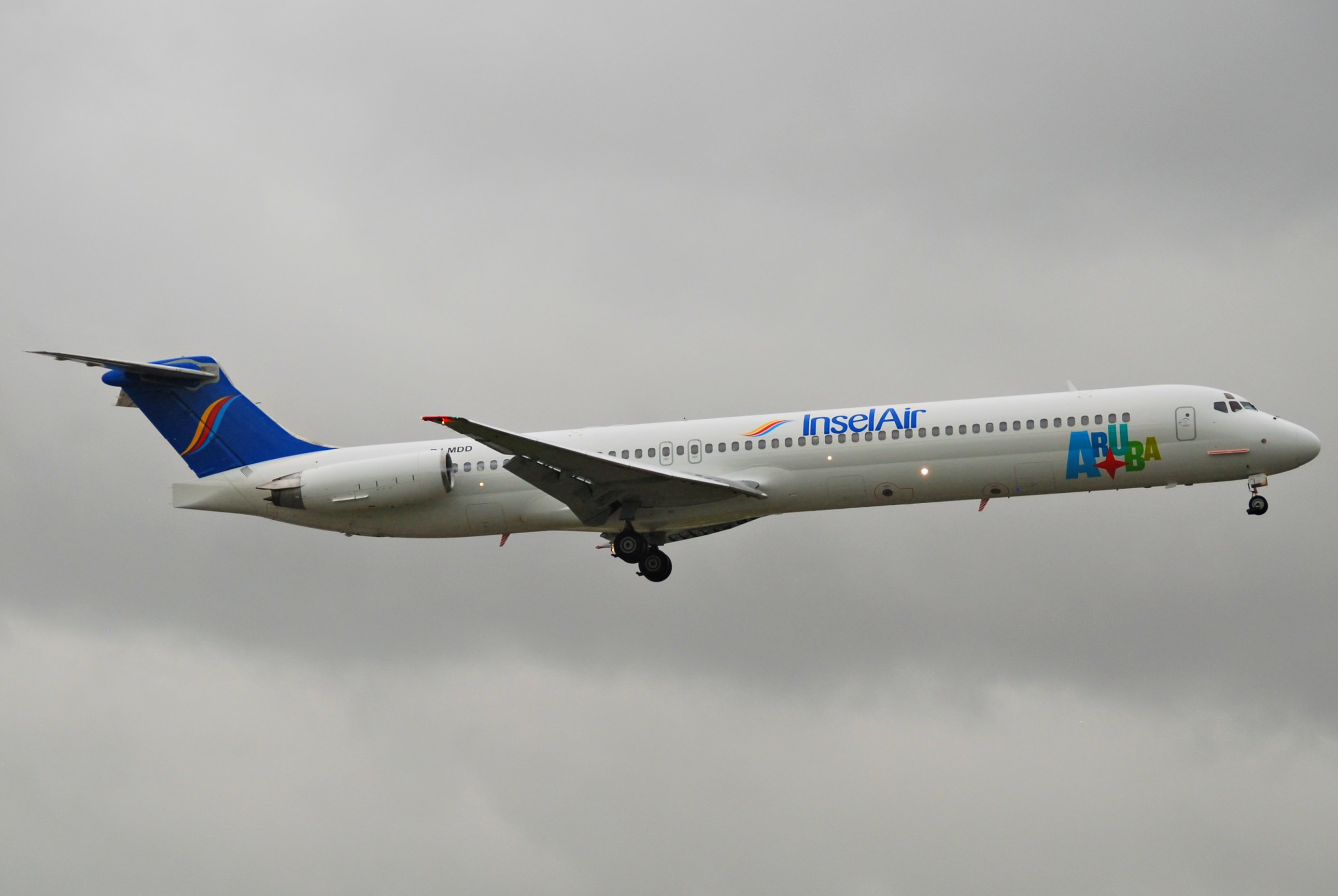 Insel Air Aruba MD-82; PJ-MDD@MIA;17.10.2011/626ie